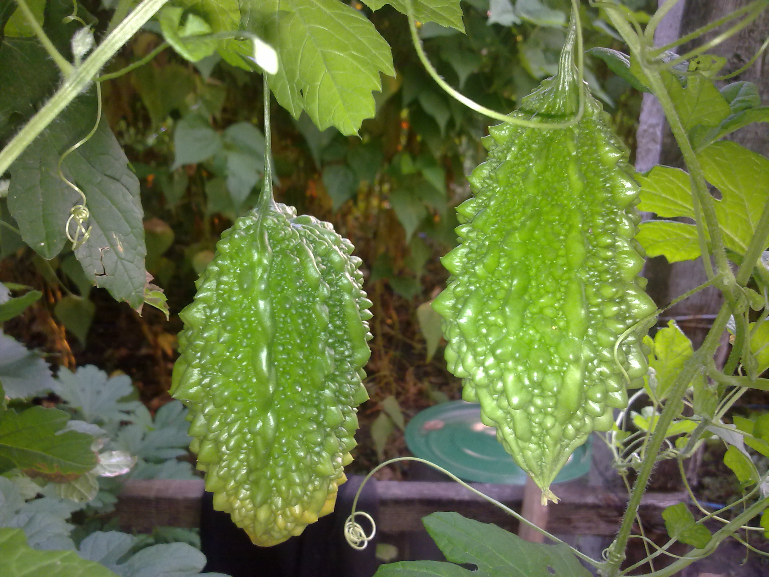 momardic